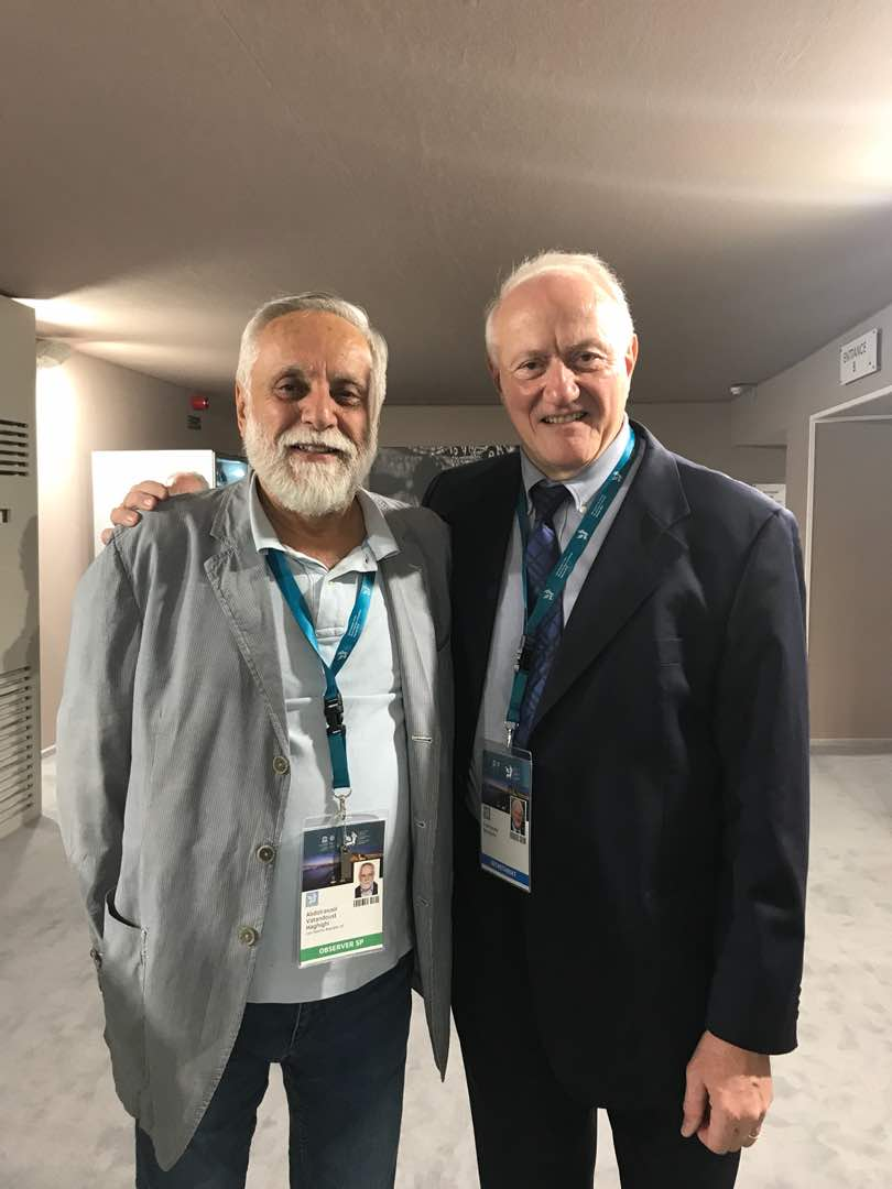 (دکتر رسول وطن‌دوست به همراه فرانچسکو باندارین (معاون مدیر کل یونسکو